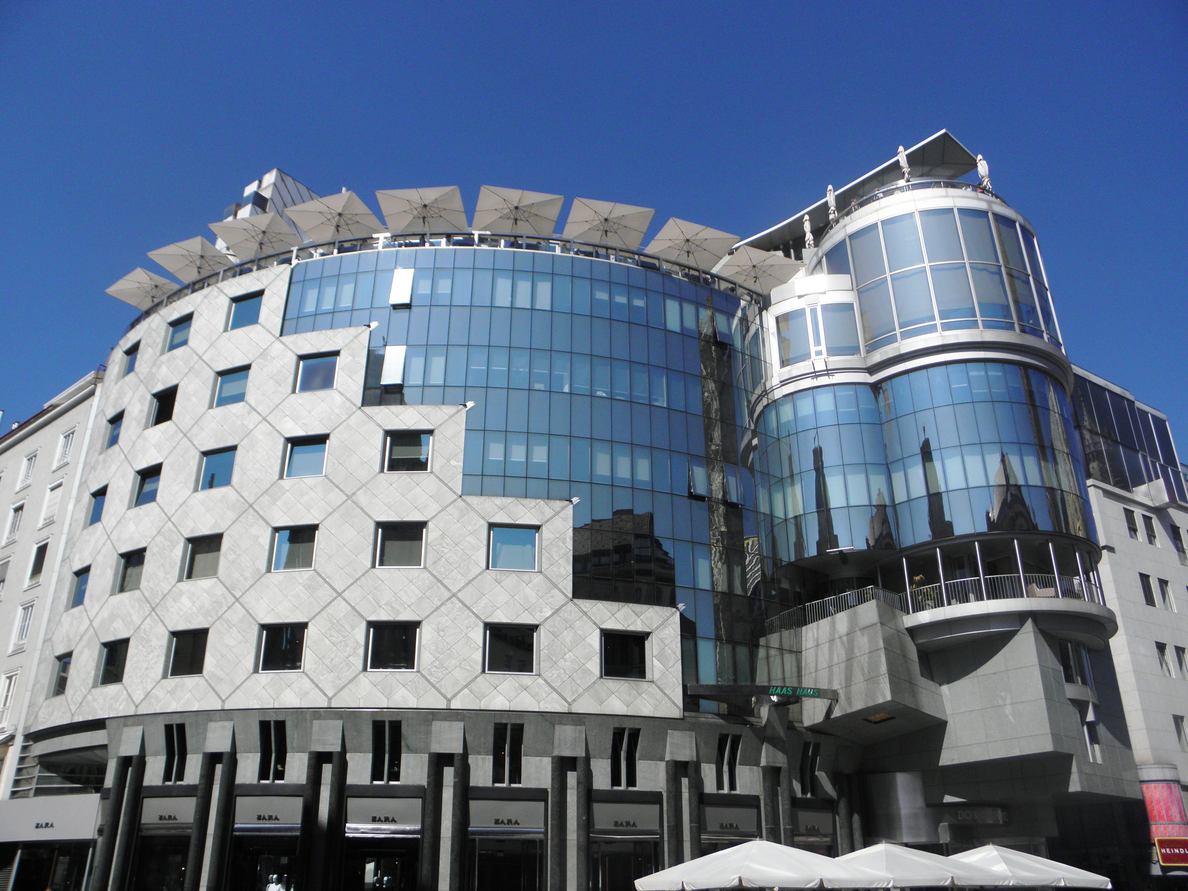 Haas-Haus von Hans Hollein am Stock-im-Eisen / Stephansplatz